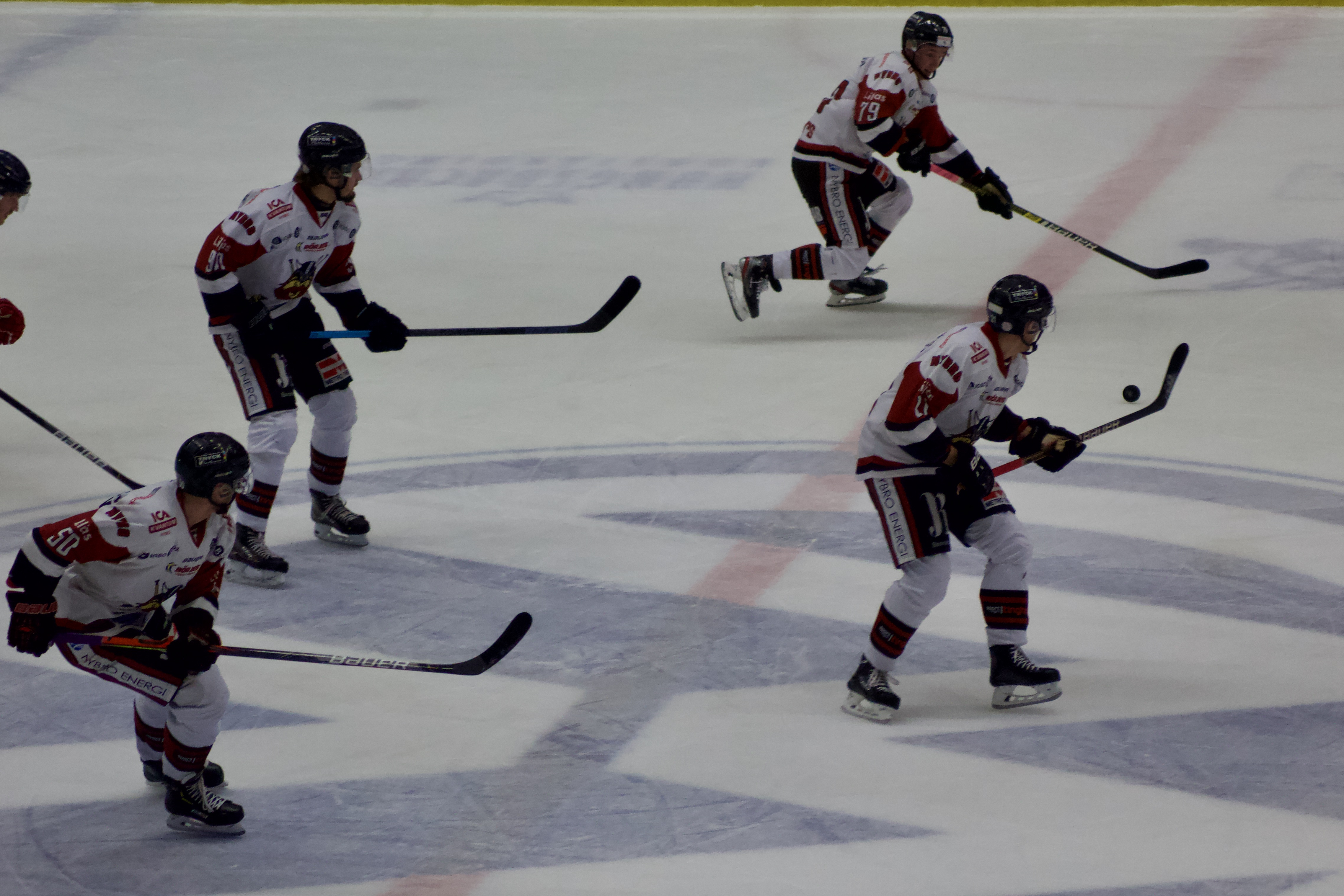 Matchinfo